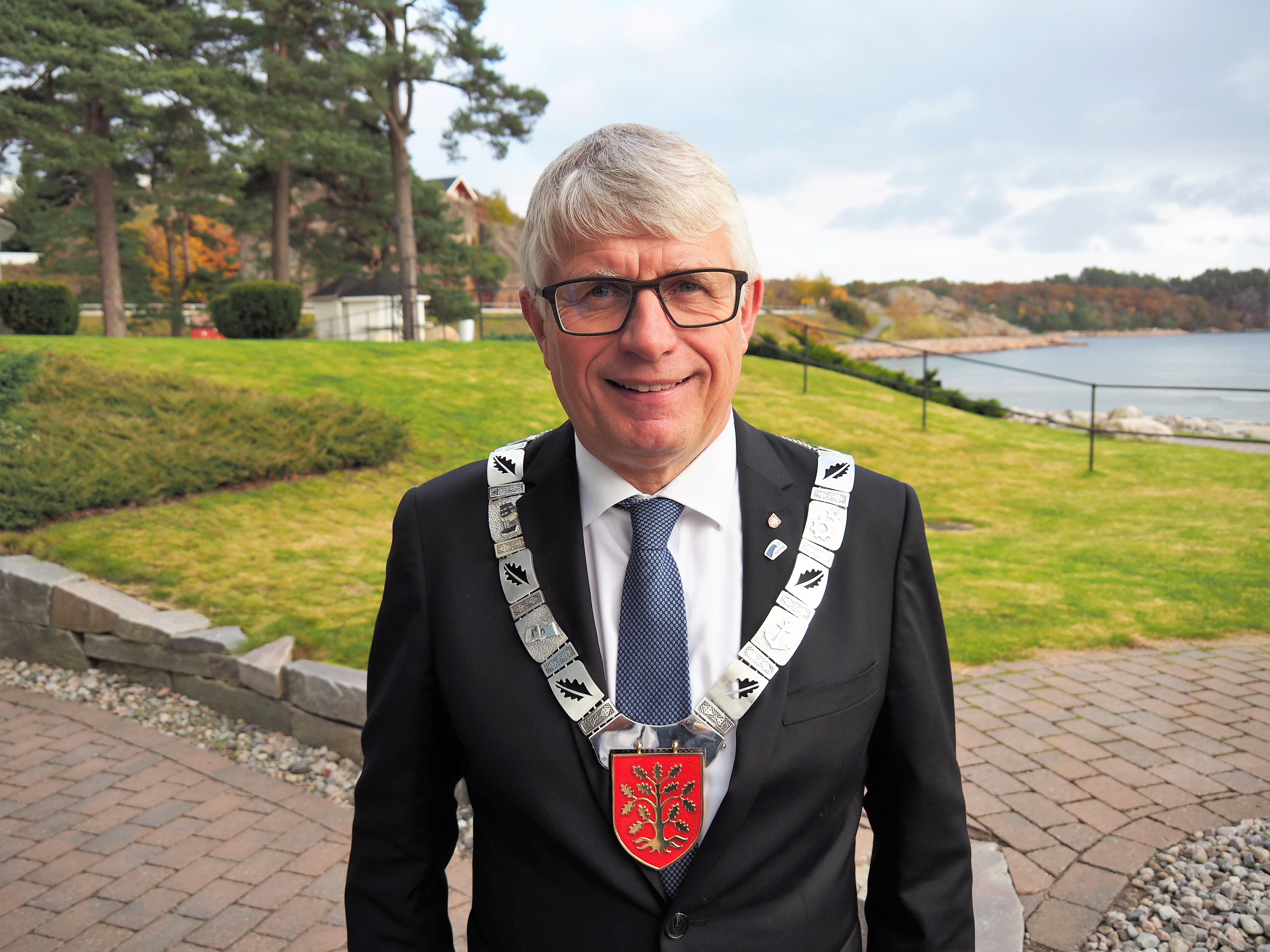 Foto av Arne Thomassen